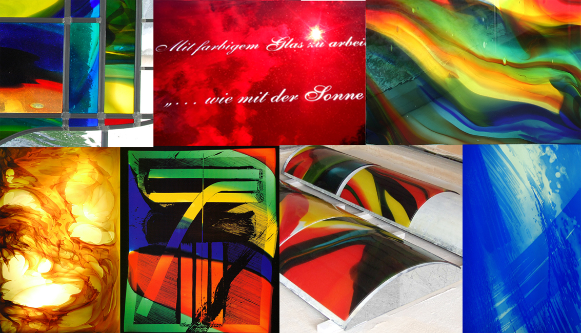 Sieben Methoden der Glasbearbeitung